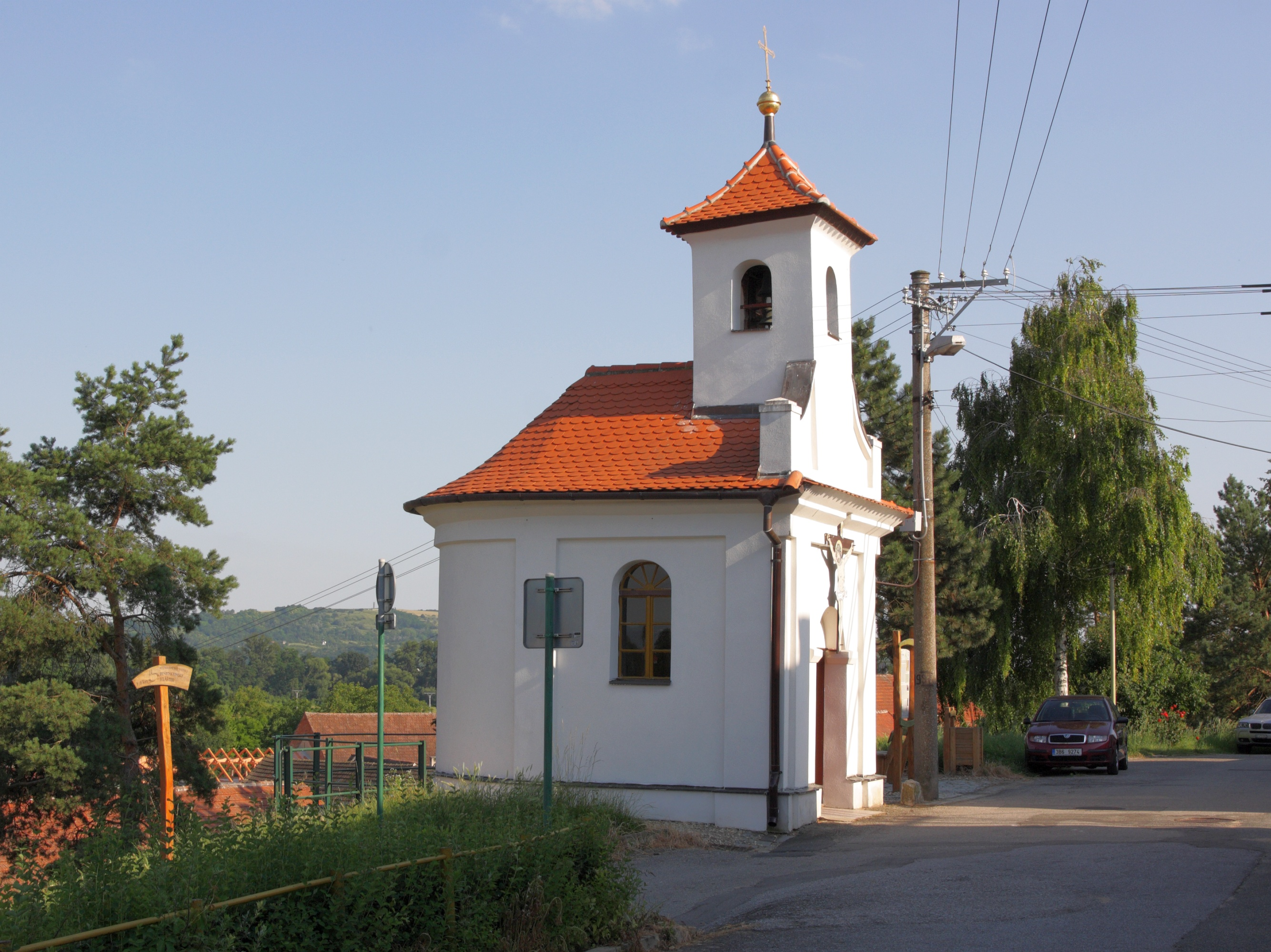 Holasice - kaple sv Václava.